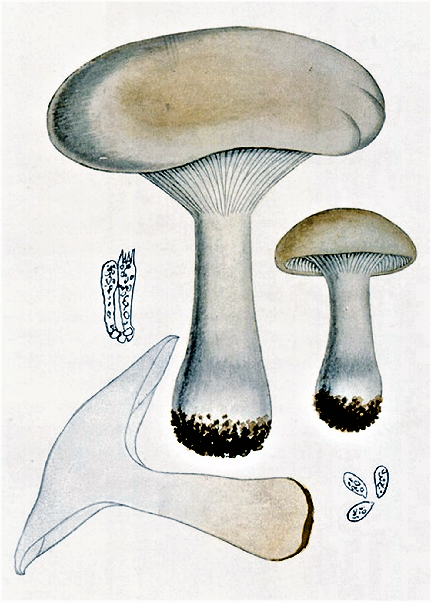 Giacomo Bresadola: Clitocybe nebularis (Batsch, 1789) P.Kumm. (1871)